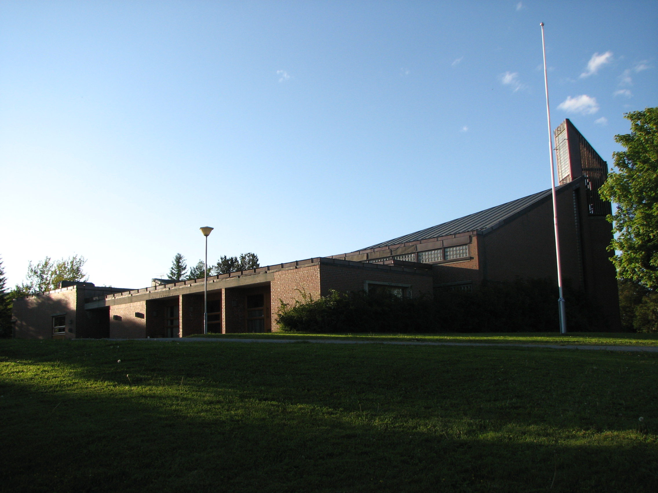 Tverlandet kirke